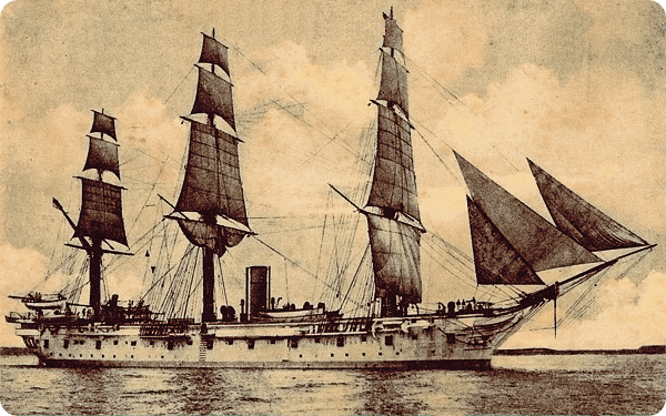 Die Glattdeckkorvette Marie der Kaiserlichen Marine